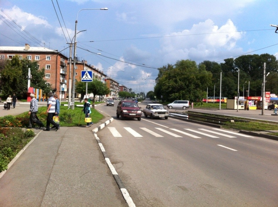 Улица Разведчиков в Орджоникидзевском районе Новокузнецка